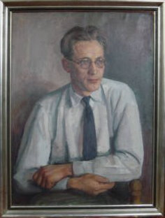 Portrait Heinrich Hauber 1934, gemalt in Oel auf Leinwand von Walter Waentig